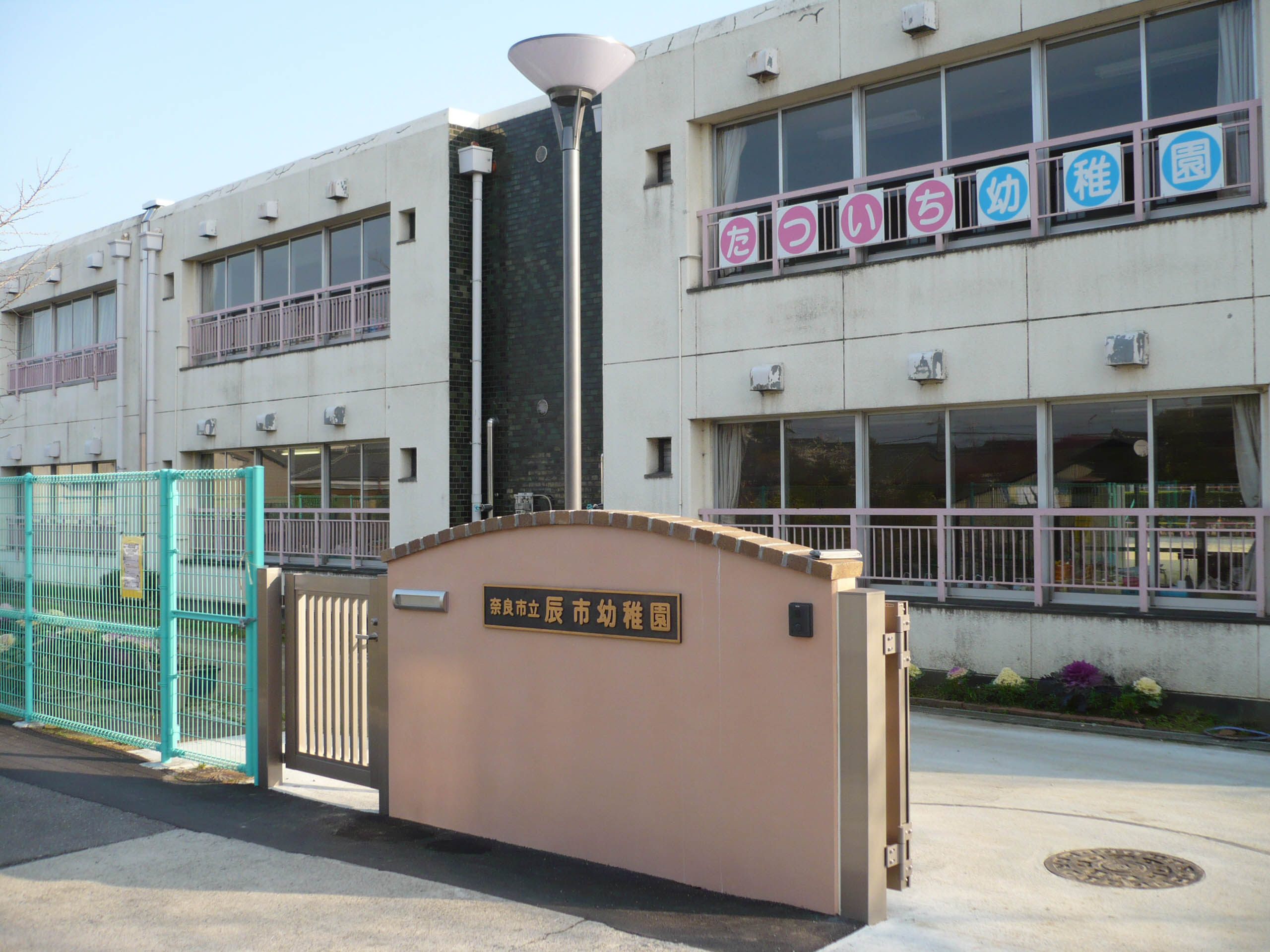 奈良市立辰市幼稚園の正門